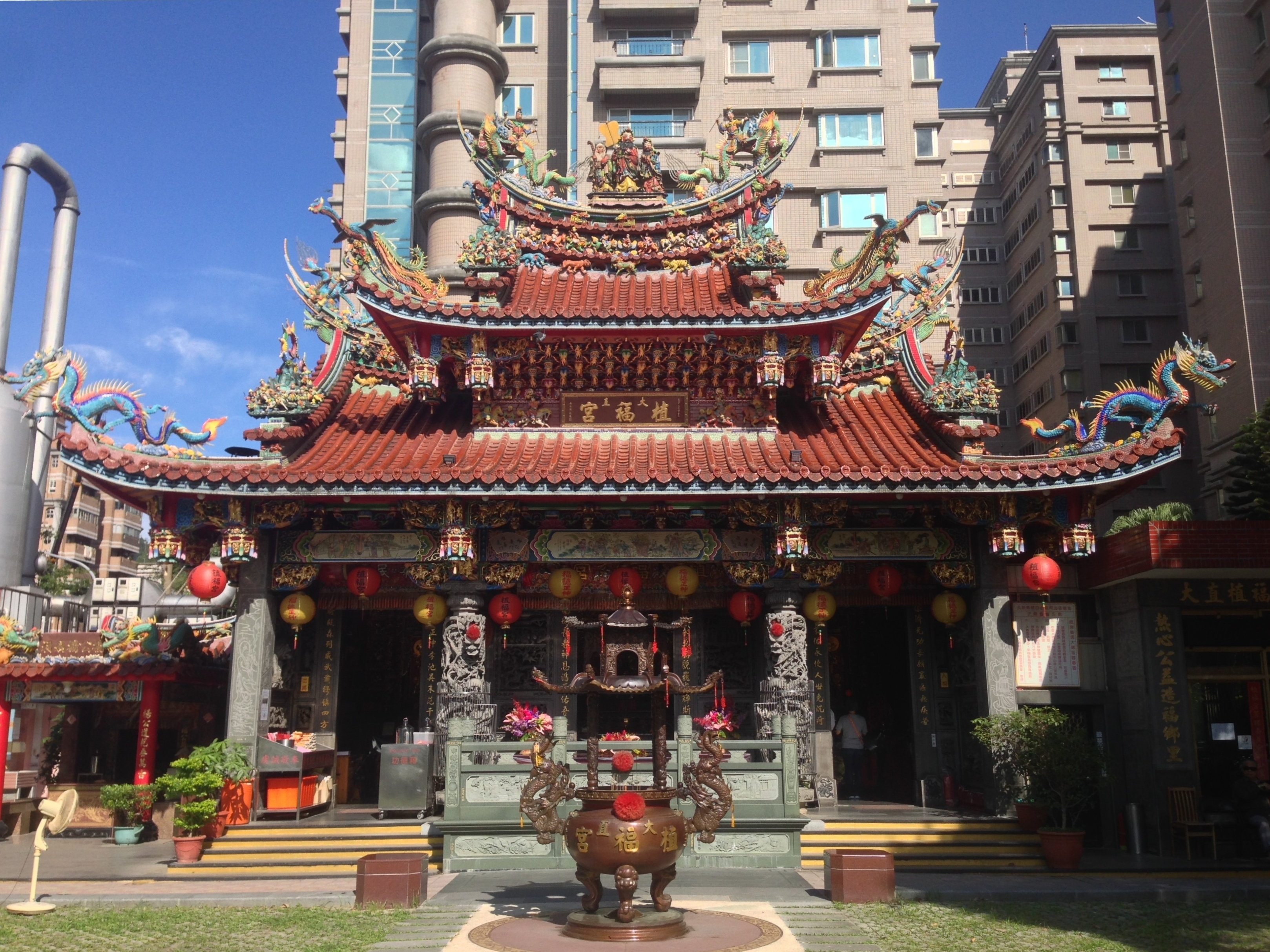 中文（台灣）: 大直植福宮